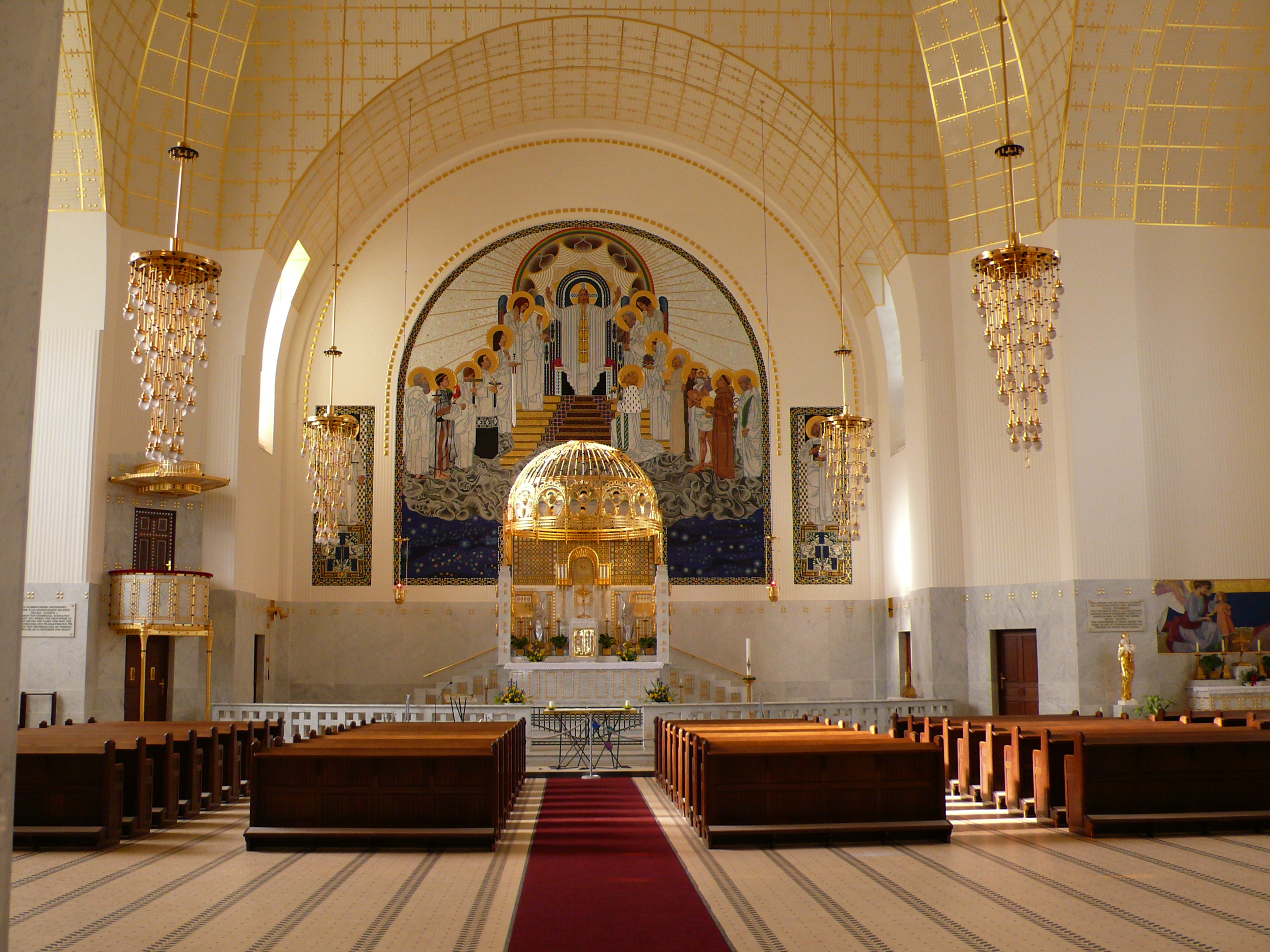 Kirche am Steinhof, Wien, Otto Wagner